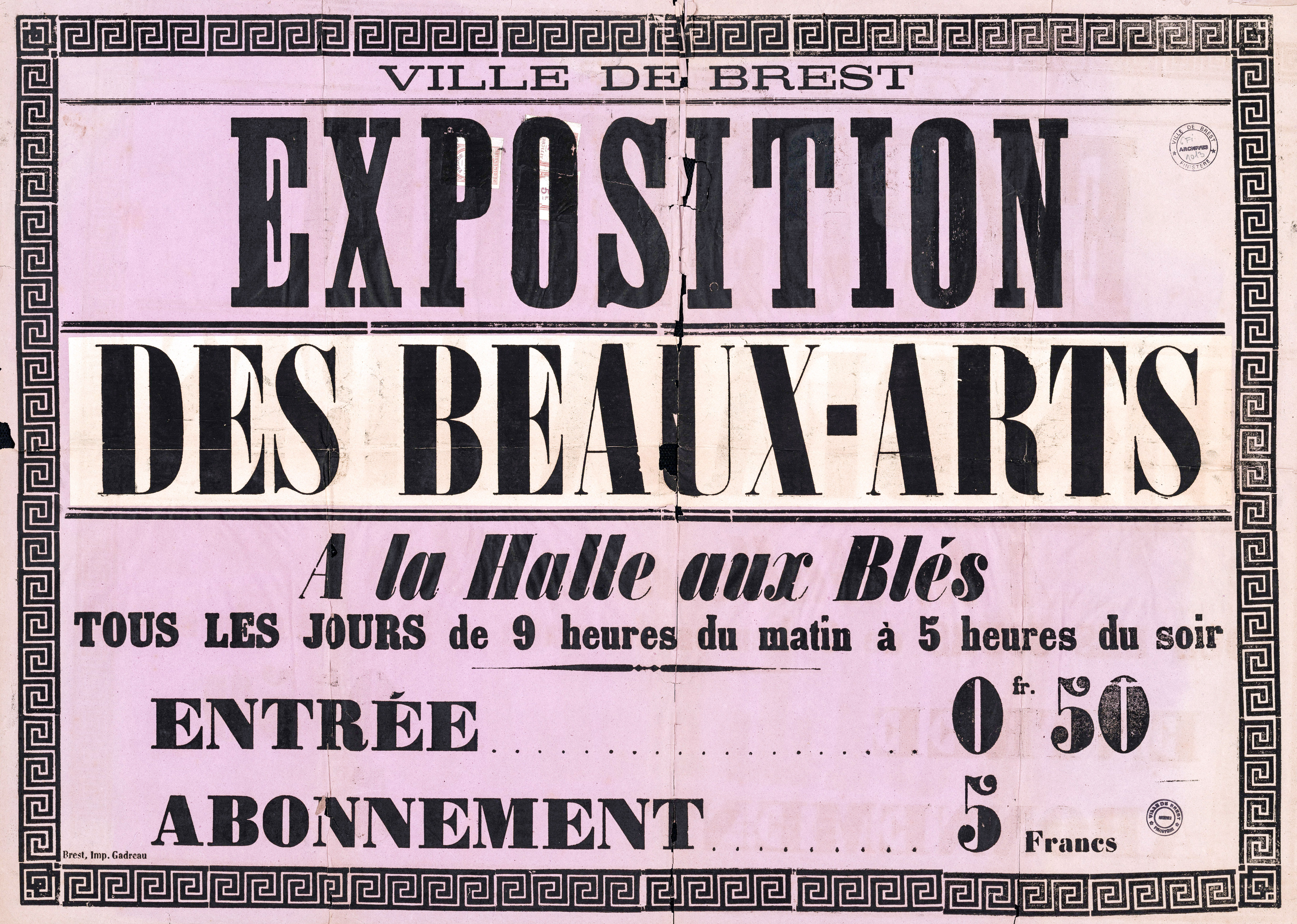 Affiche de l'exposition des Beaux-Arts à la Halle aux Blés, avant ouverture du Musée, le 26 avril 1875. (archives de Brest 6Fi1013)